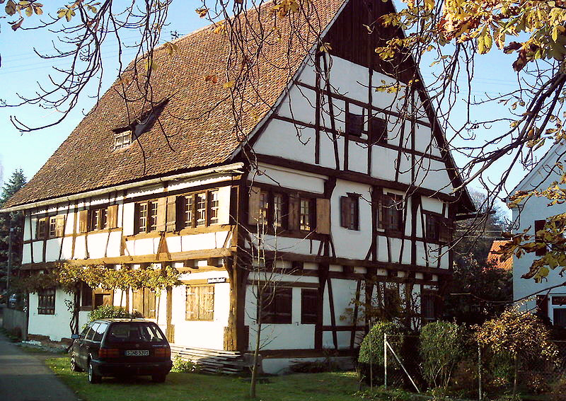 Alter Pfarrhof, 88459 Tannheim, Deutschland